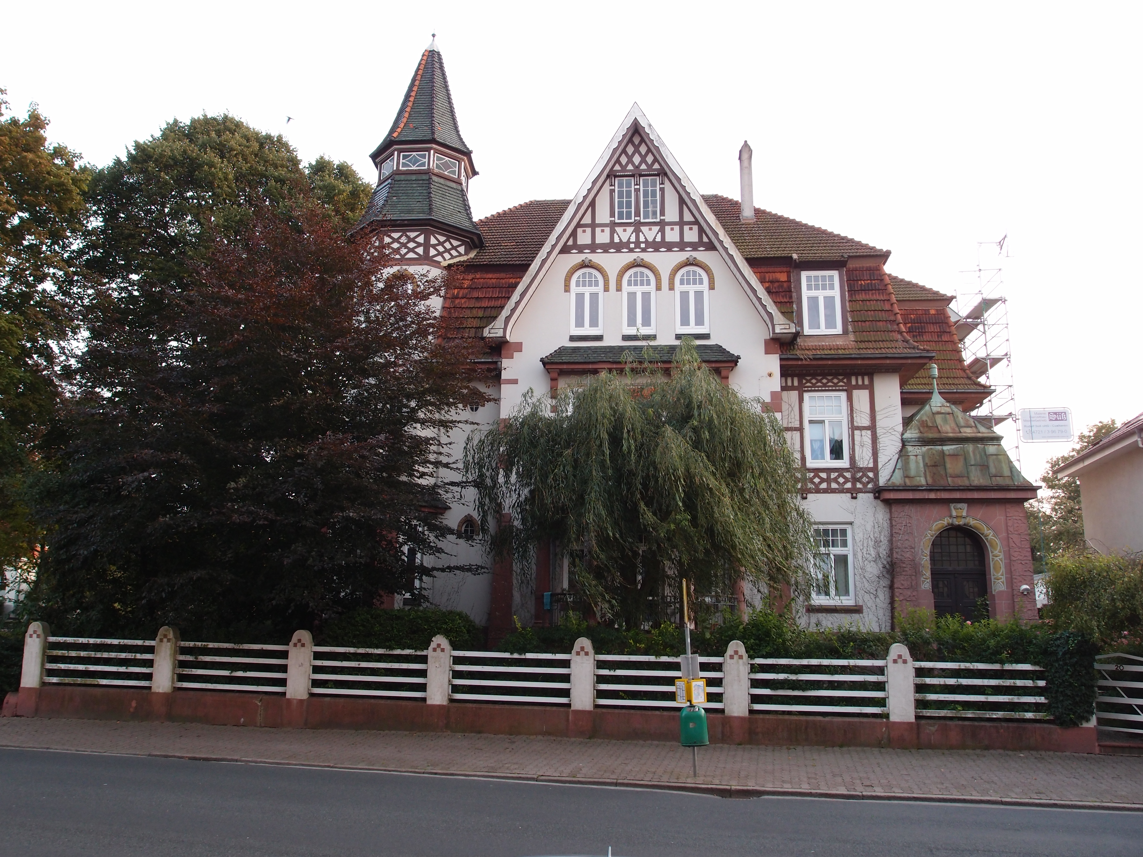 Strichweg 20 Strassenansicht Fassade Lichtenbergplatz